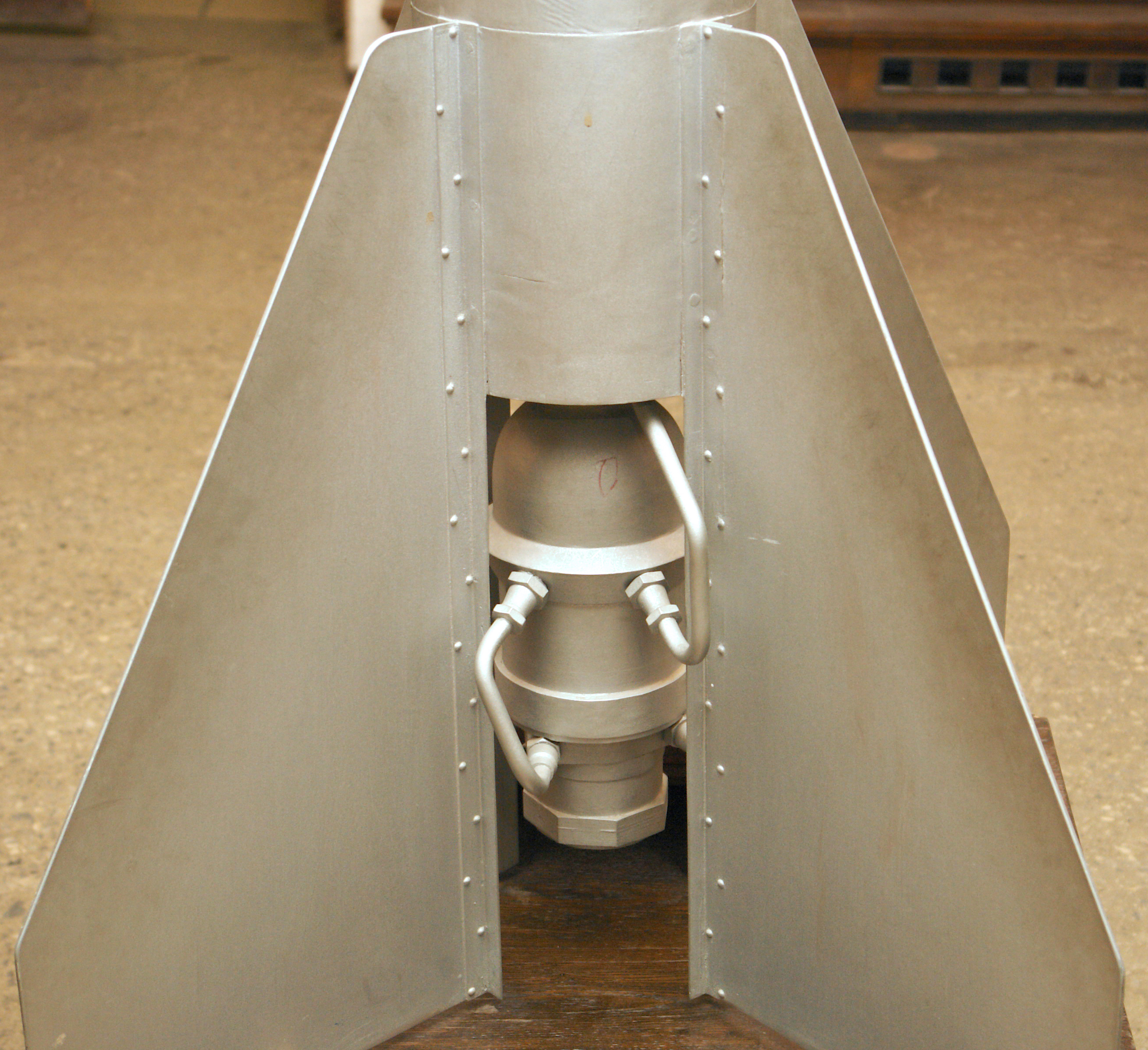 Экспериментальный жидкостный ракетный двигатель ОРМ-52 в составе ракеты РЛА-2. Музей космонавтики и ракетной техники; Санкт-Петербург. This photograph was taken in Museum of Space and Missile Technology (Saint Petersburg) Object location59° 57′ 07″ N, 30° 19′ 16″ E